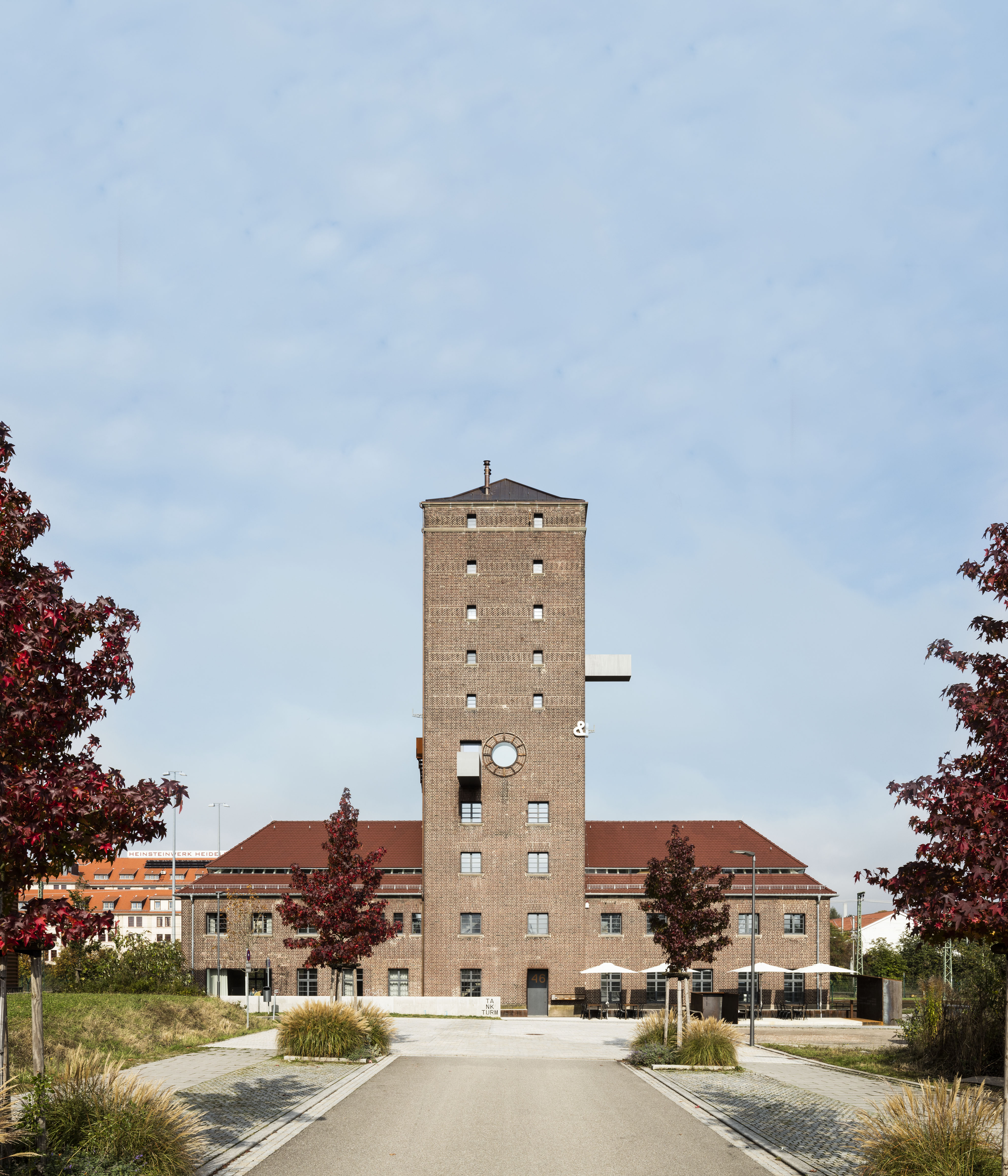 Foto: Thomas Ott